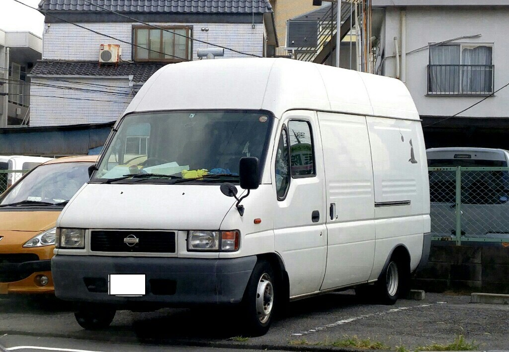 日産アトラス